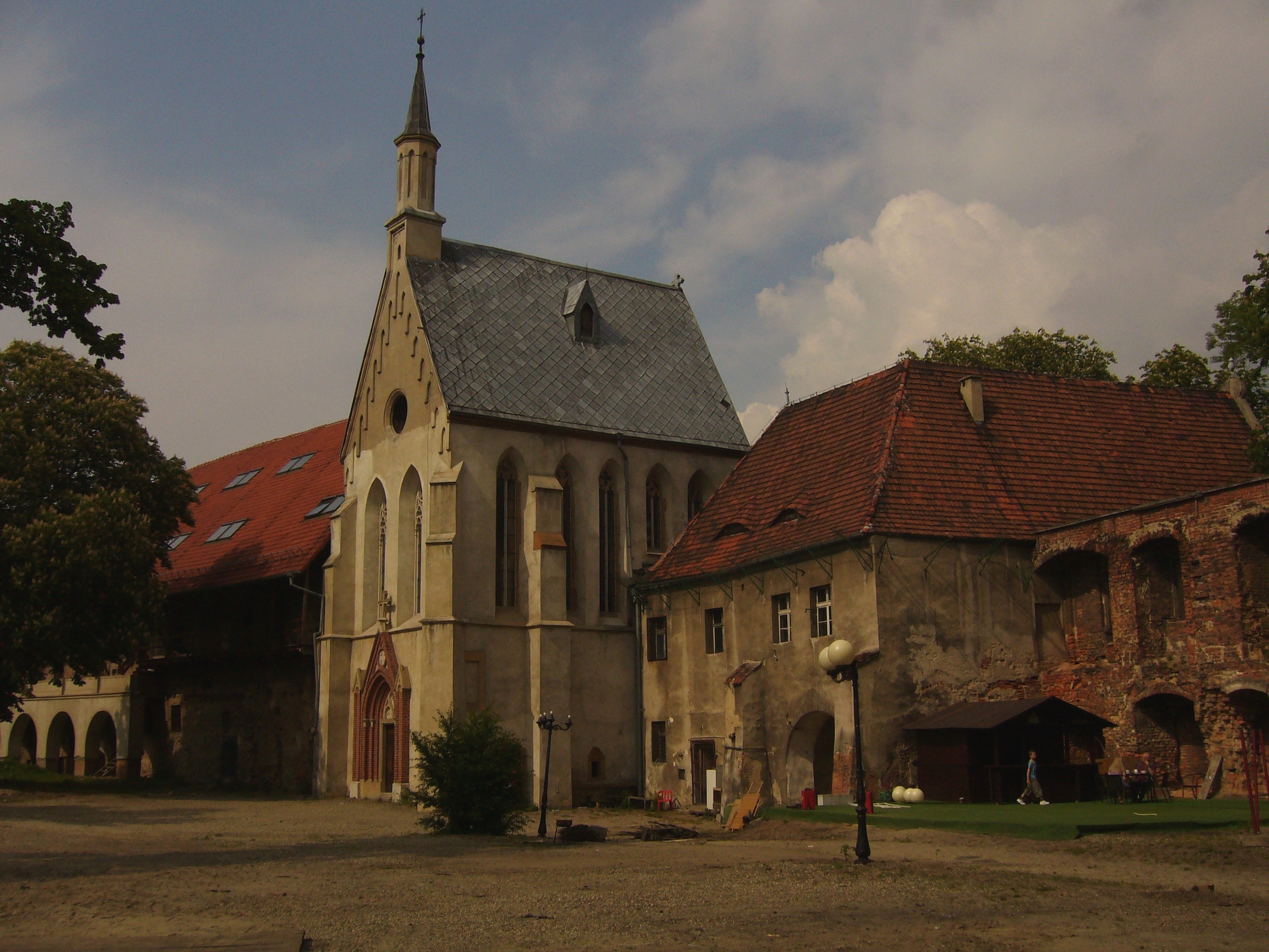 Zamek Książąt Raciborskich w Raciborzu od najdalszego planu: skrzydło zamkowe, kaplica, budynek bramny, fragmnet ruin